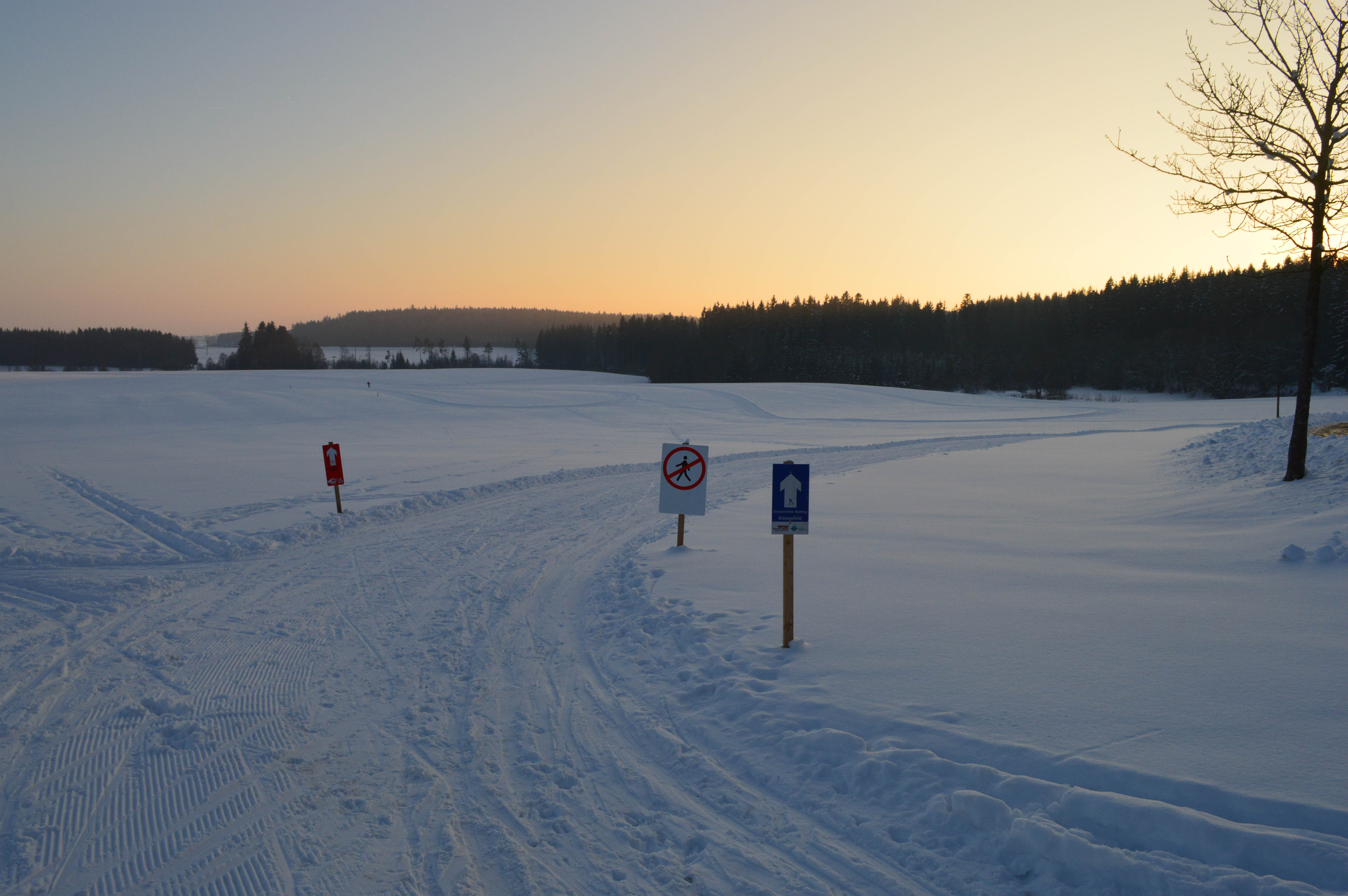 Königsfeld Loipe Enzianwiese 2017